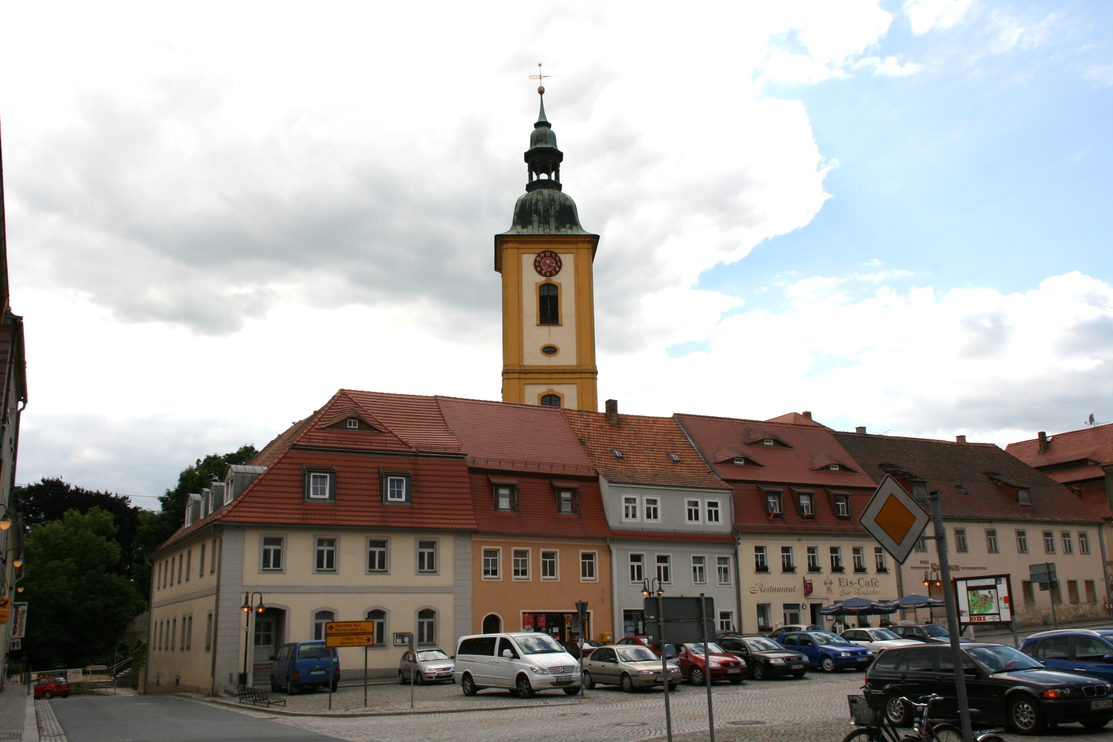 Marktplatz an Bautzener Straße / Görlitzer Straße in Bernstadt a. d. Eigen